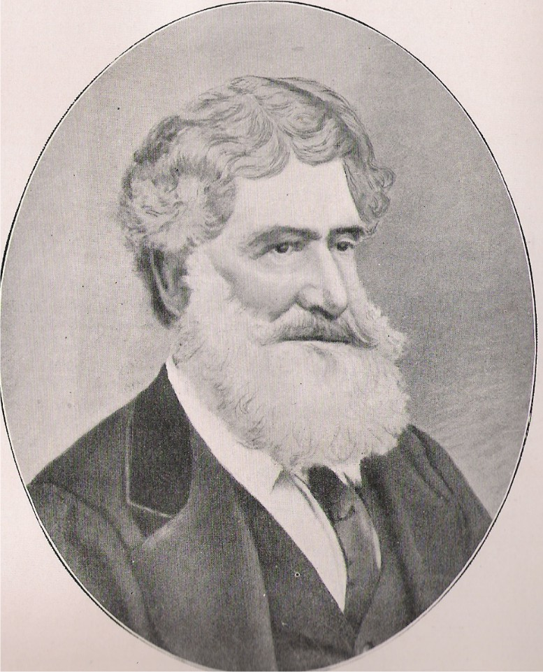 Celedonio Gutiérrez Gramajo - Gobernador de Tucumán